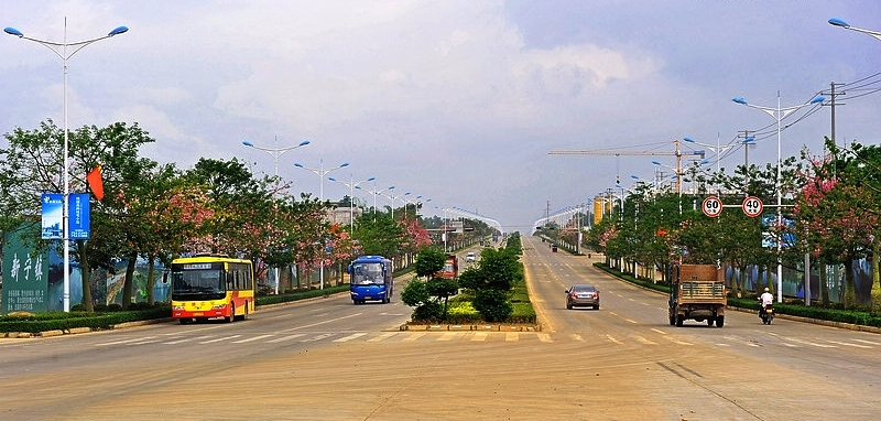 中文（中国大陆）: 扶绥大道新貌